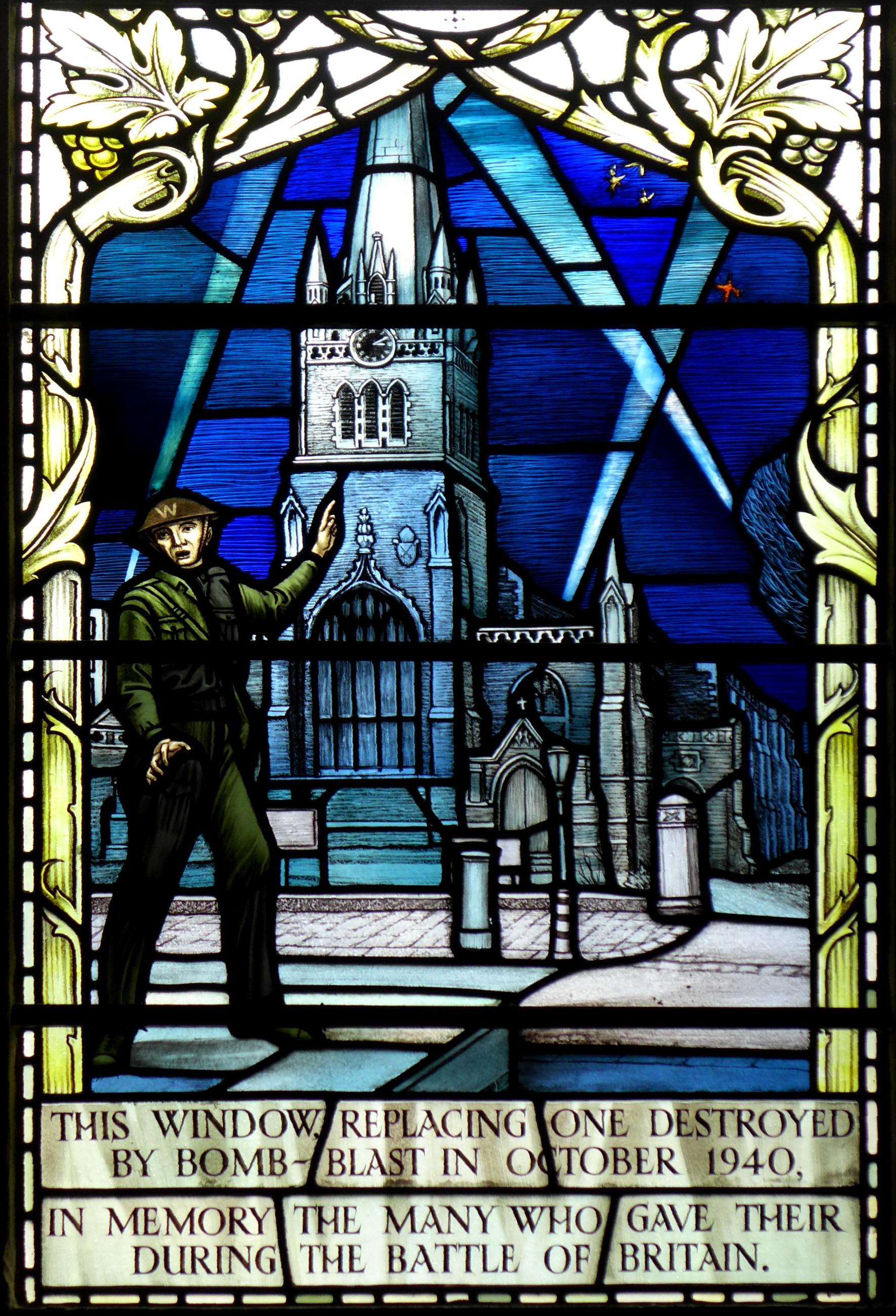 Teilansicht eines bleiverglasten Kirchenfensters mit Glasmalerei in der Kirche St James, Sussex Gardens, London. Erinnerung an einen Bombeneinschlag im Oktober 1940, Weltkrieg2.